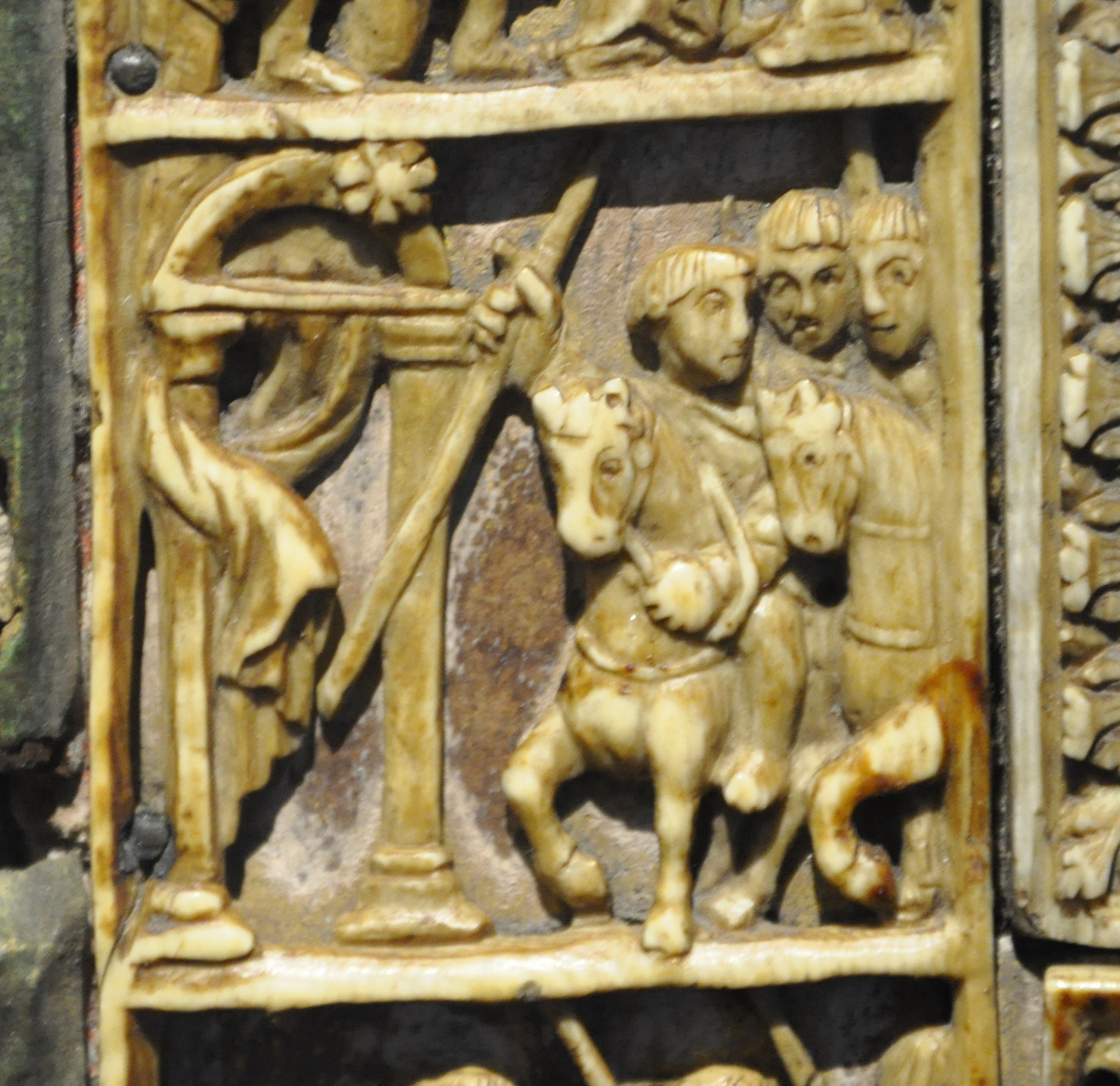 Detail von: Elfenbeinreliefs Zeugnis Johannes des Täufers und Szezen aus der Geburtsgeschichte Jesu, Metz um 850, in Auftrag gegeben von Drogo, Erzbischof von Metz und Sohn Karls des Großen; Liebieghaus Frankfurt am Main; Leihgabe der Universitätsbibliothek Frankfurt am Main, Signatur Ms. Barth. 180 (Buchdeckel um 1250 für eine Handschrift für die Bartholomäuskirche Frankfurt geschaffen unter Verwendung der Reliefs des 9. Jahrhunderts)